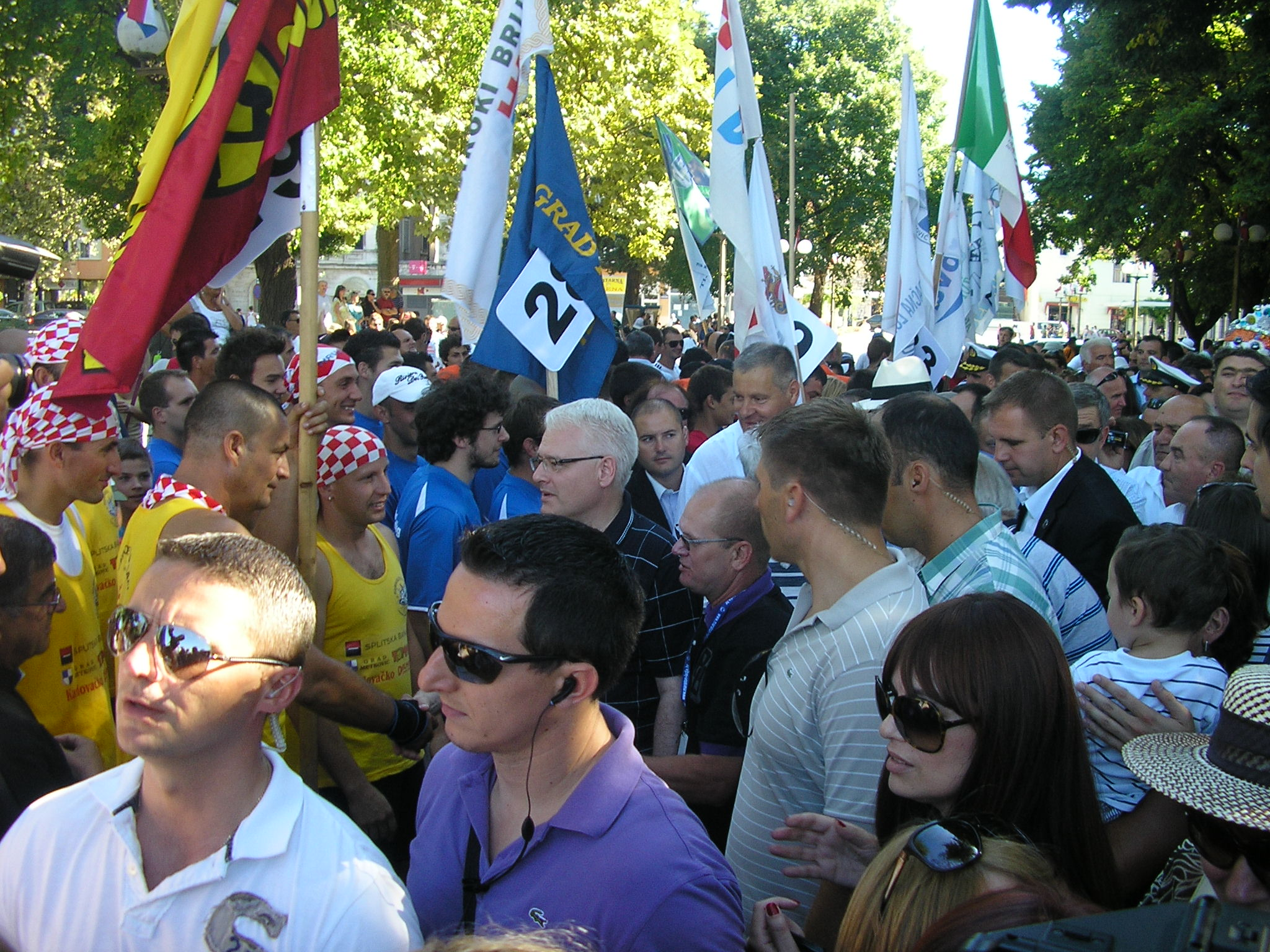 Predsjednik RH Ivo Josipović s lađarima (Maraton lađa 2011.)